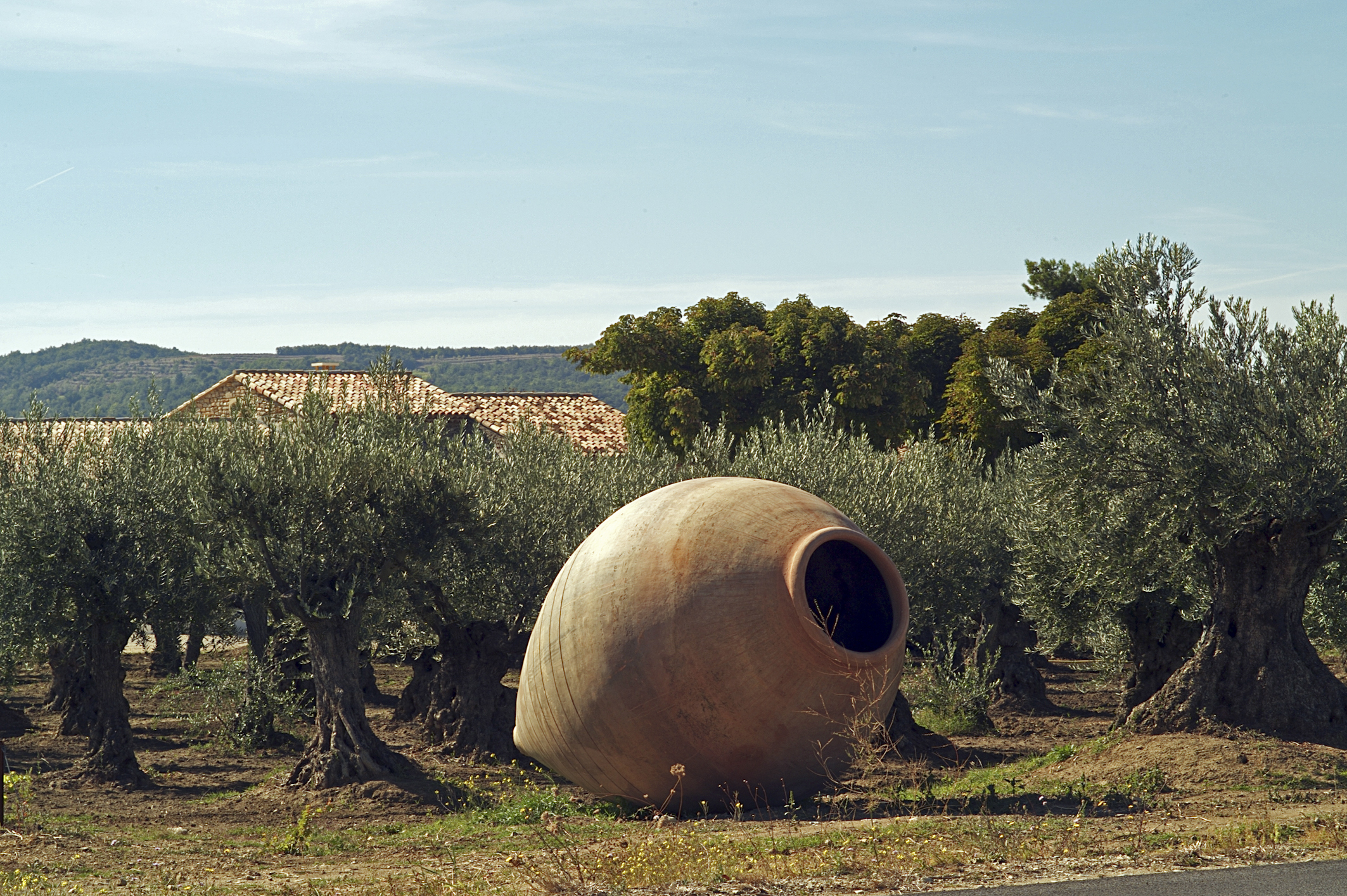 INRA, Jean Weber